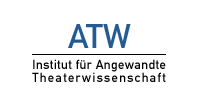 Logo von Institut für Angewandte Theaterwissenschaften der Justus-Liebig-Universität Gießen.